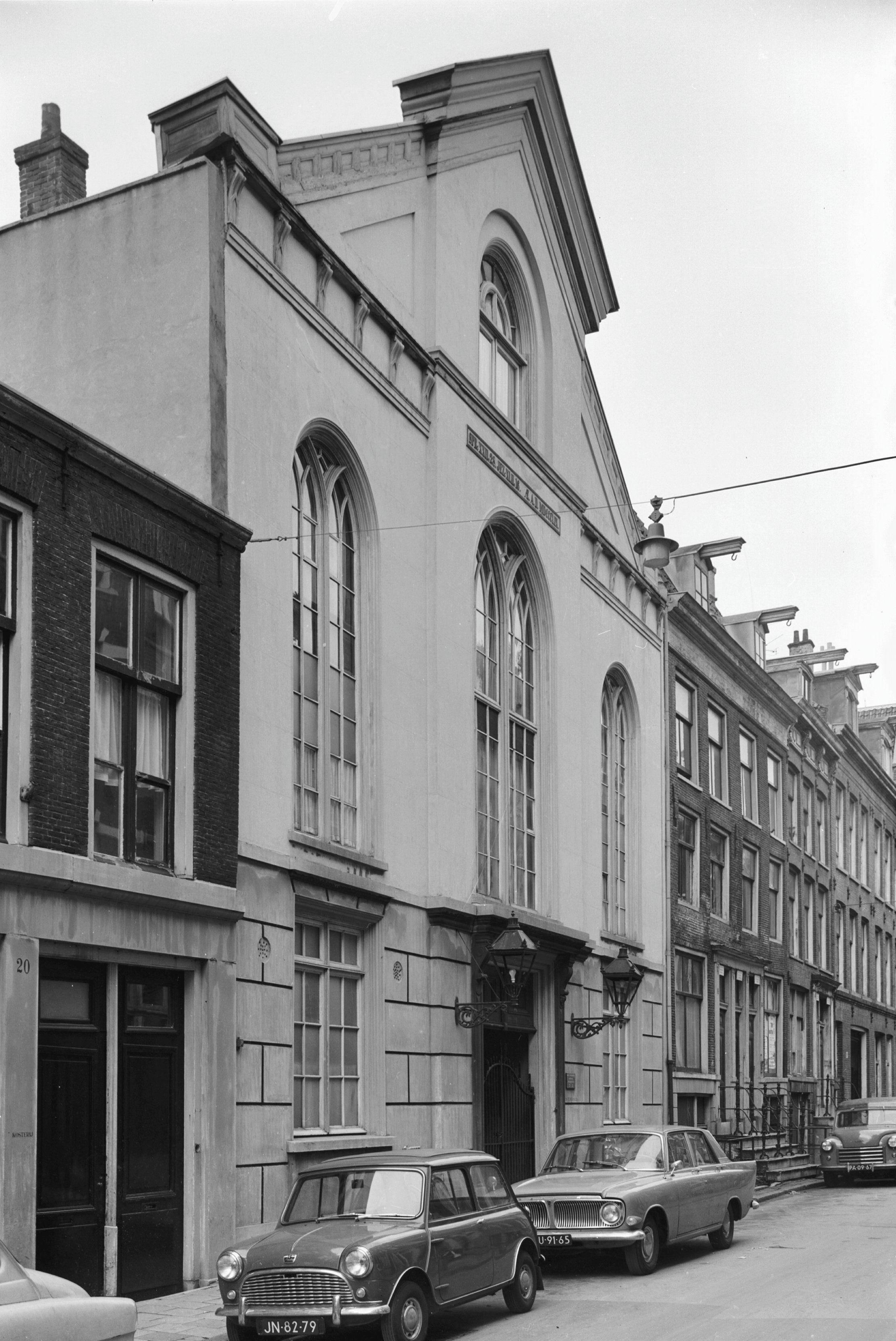 voorgevel